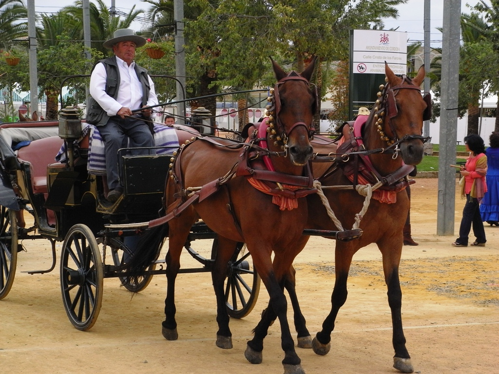 Coche de Caballos en la Feria de Córdoba (España).